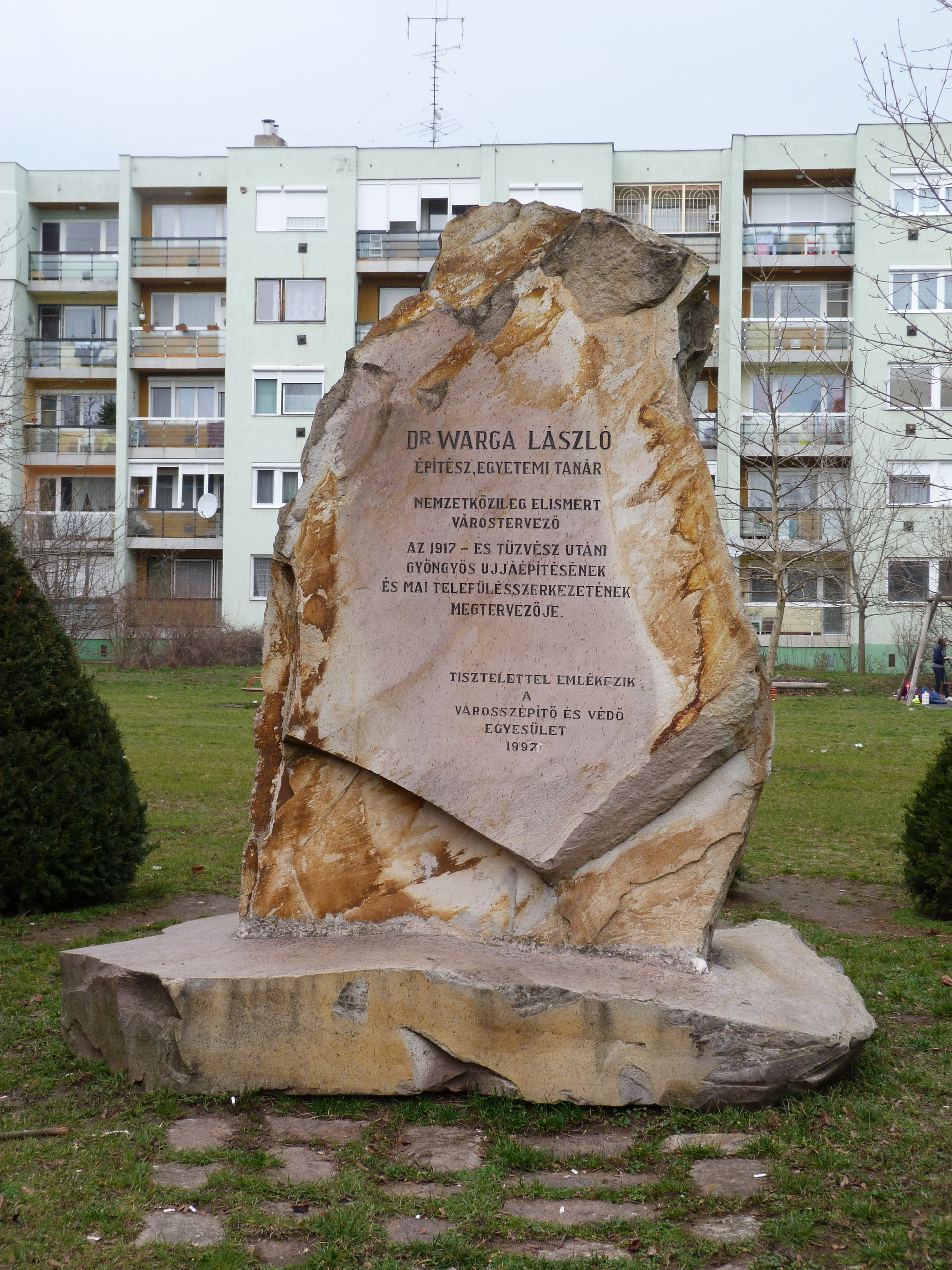 A felvétel 2014. február 28 -án készült Gyöngyösön. Dr. Warga László emlékműve. ©© Derzsi Elekes Andor, Budapest, 2014, You are authorised to use these photos and vids under Creative Commons – even for commercial, for profit purposes. Photos must be attributed to Derzsi Elekes Andor. All of the photos and vids in the Metapolisz DVD line are under Creative Commons and can be used even for commercial – for profit – purposes. Recommended Citation Derzsi Elekes Andor: Metapolisz DVD line